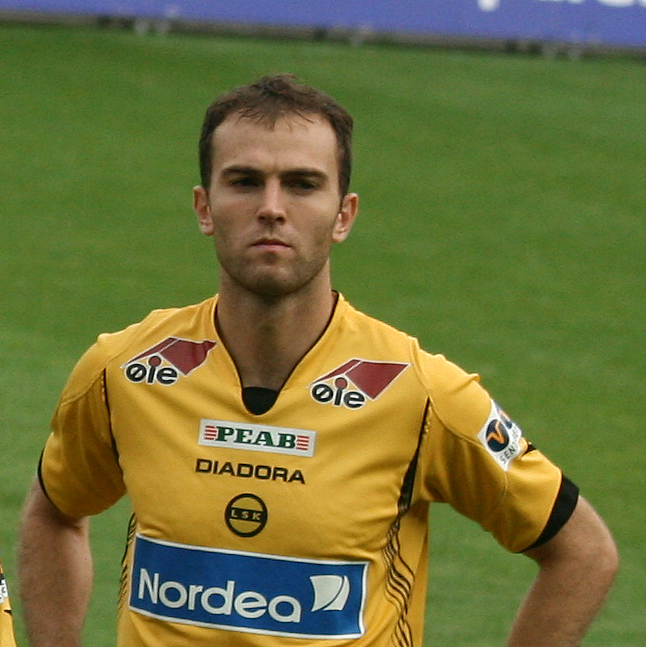 Karim Essediri